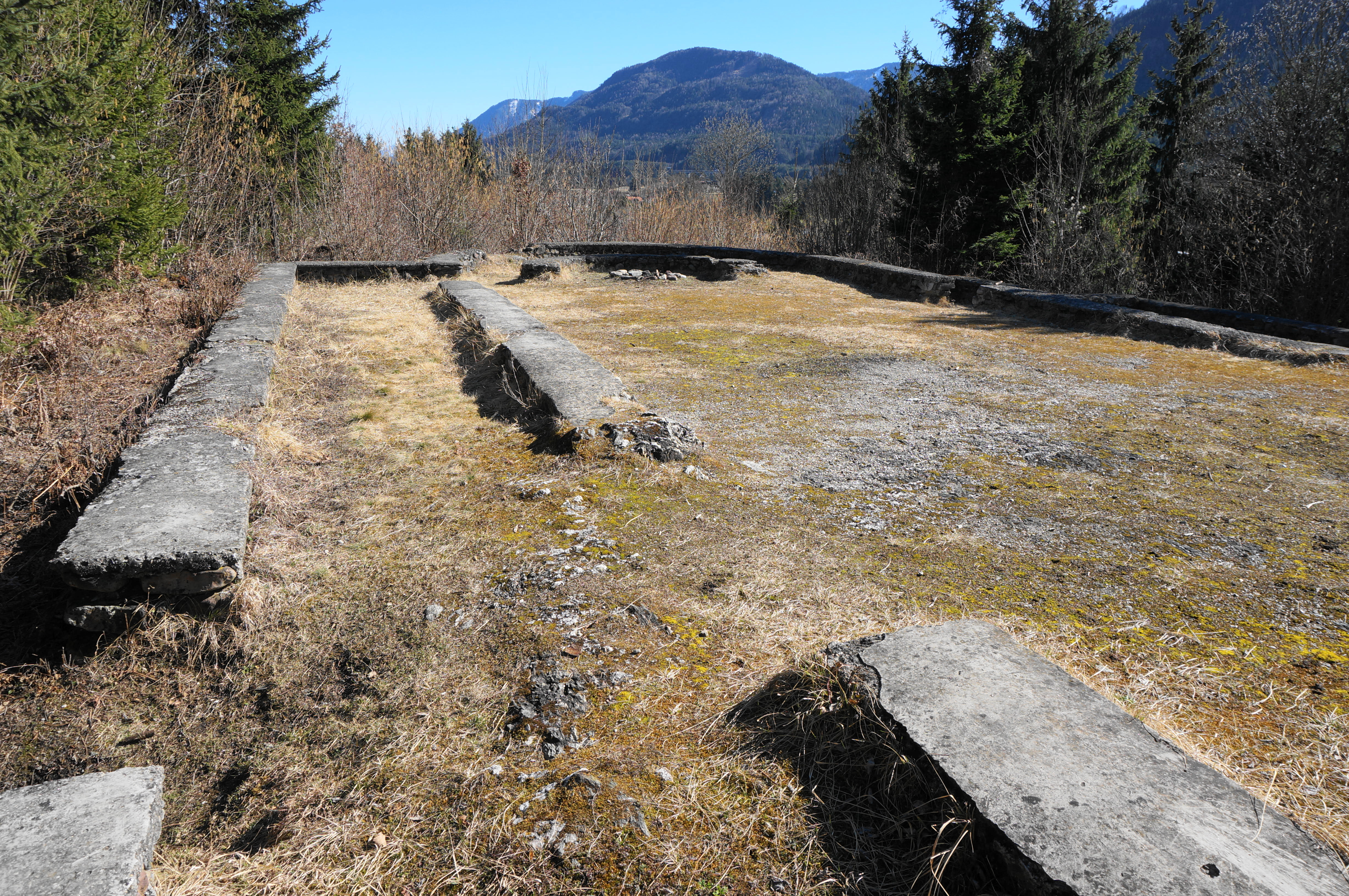 Reste der spätantiken Höhensiedlung der Römer Duel in Nikelsdorf, Gemeinde Paternion, Bezirk Villach Land